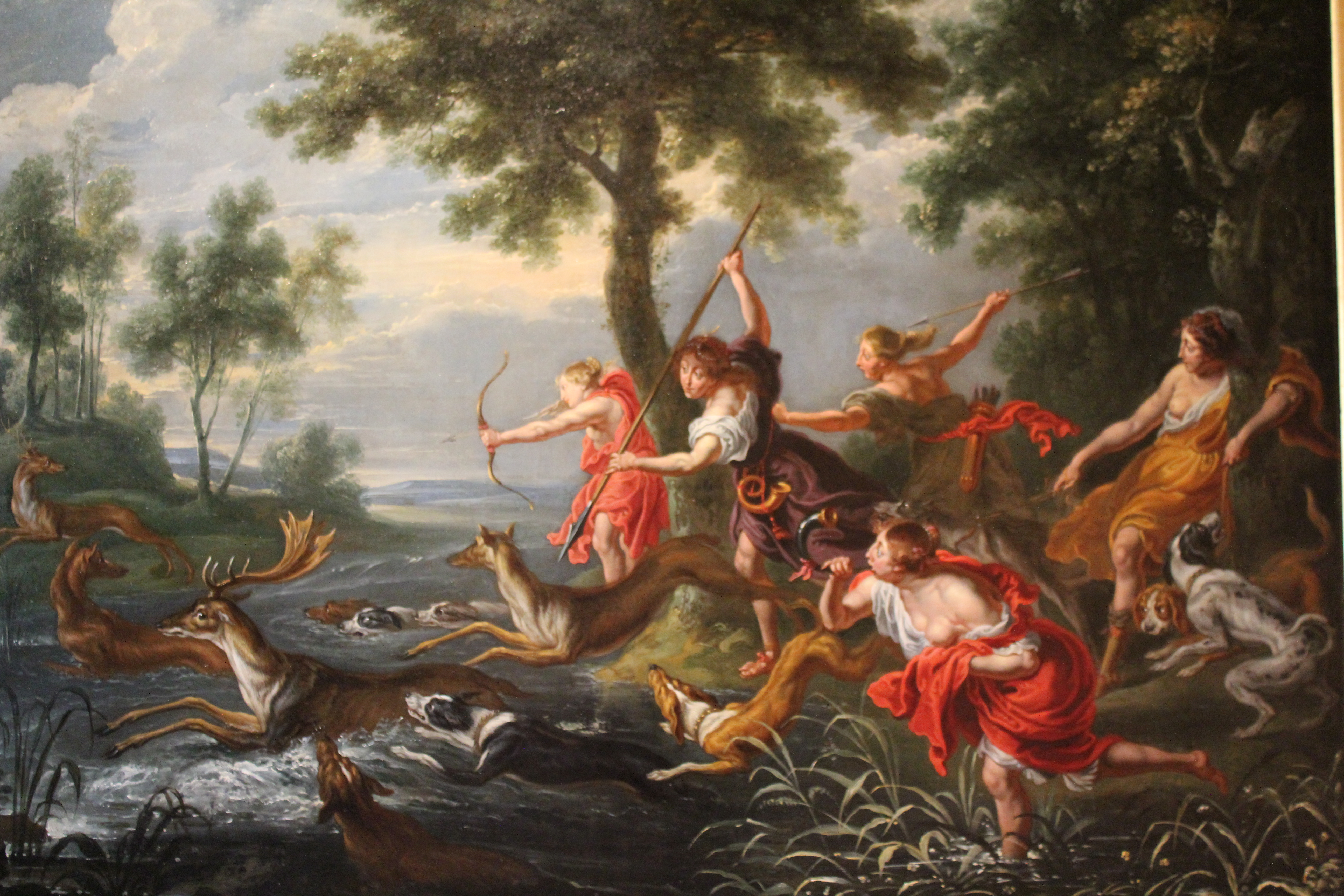 Diane